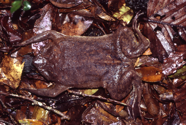 Pipa pipa